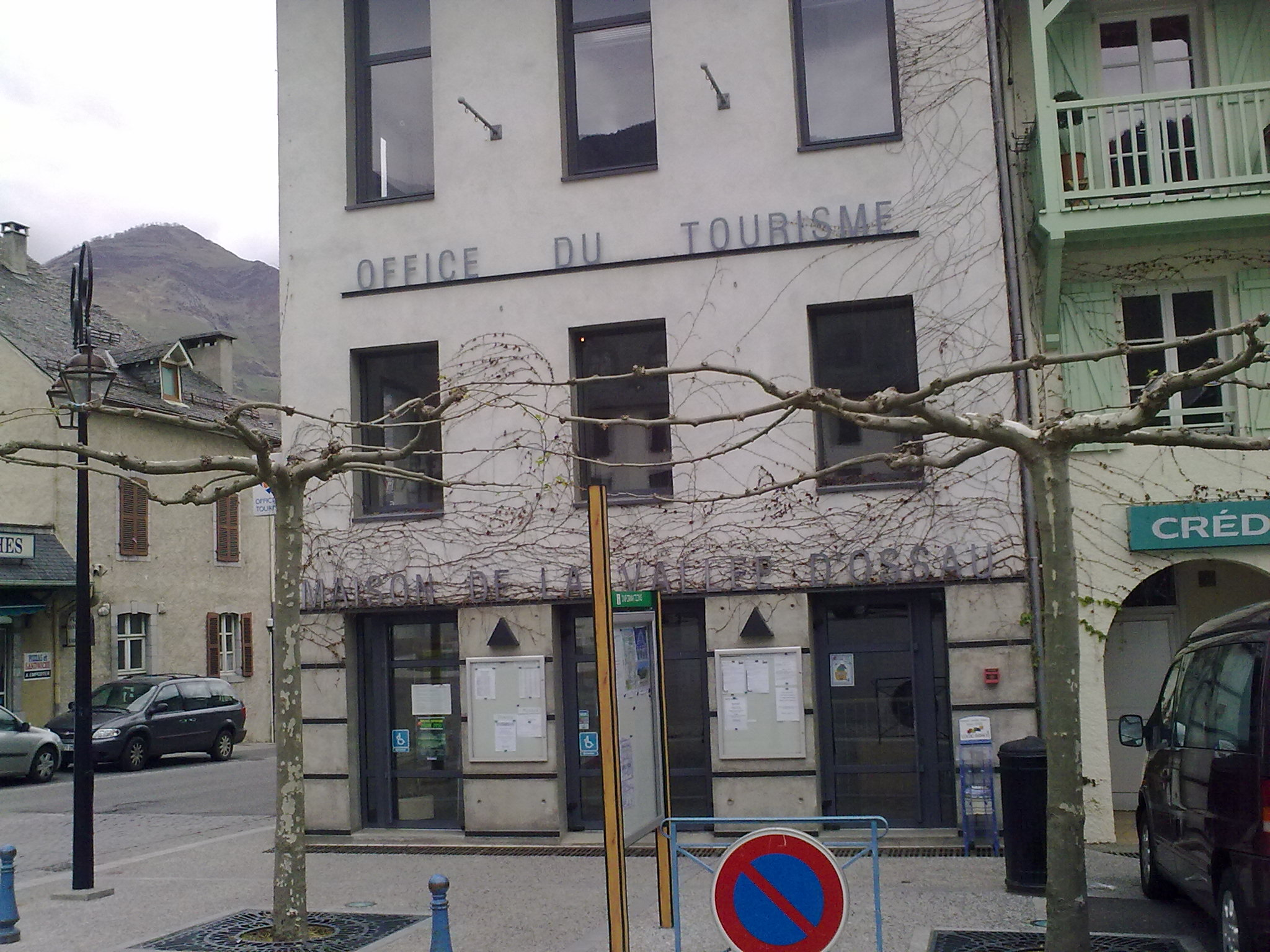 Laruns